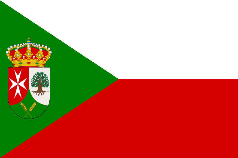 Bandera de Carranque (Toledo)